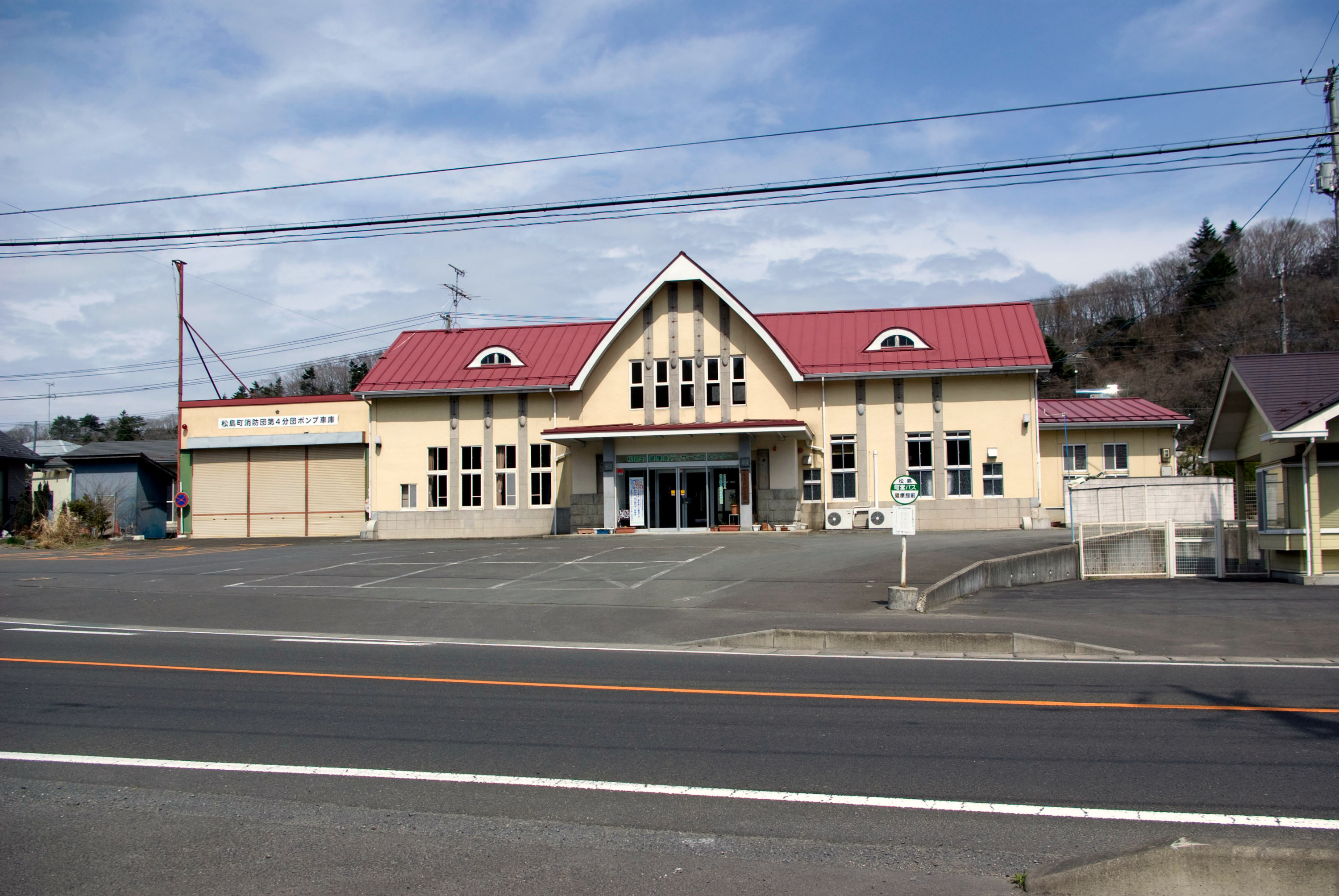 松島町健康館、初代松島駅舎の再利用である